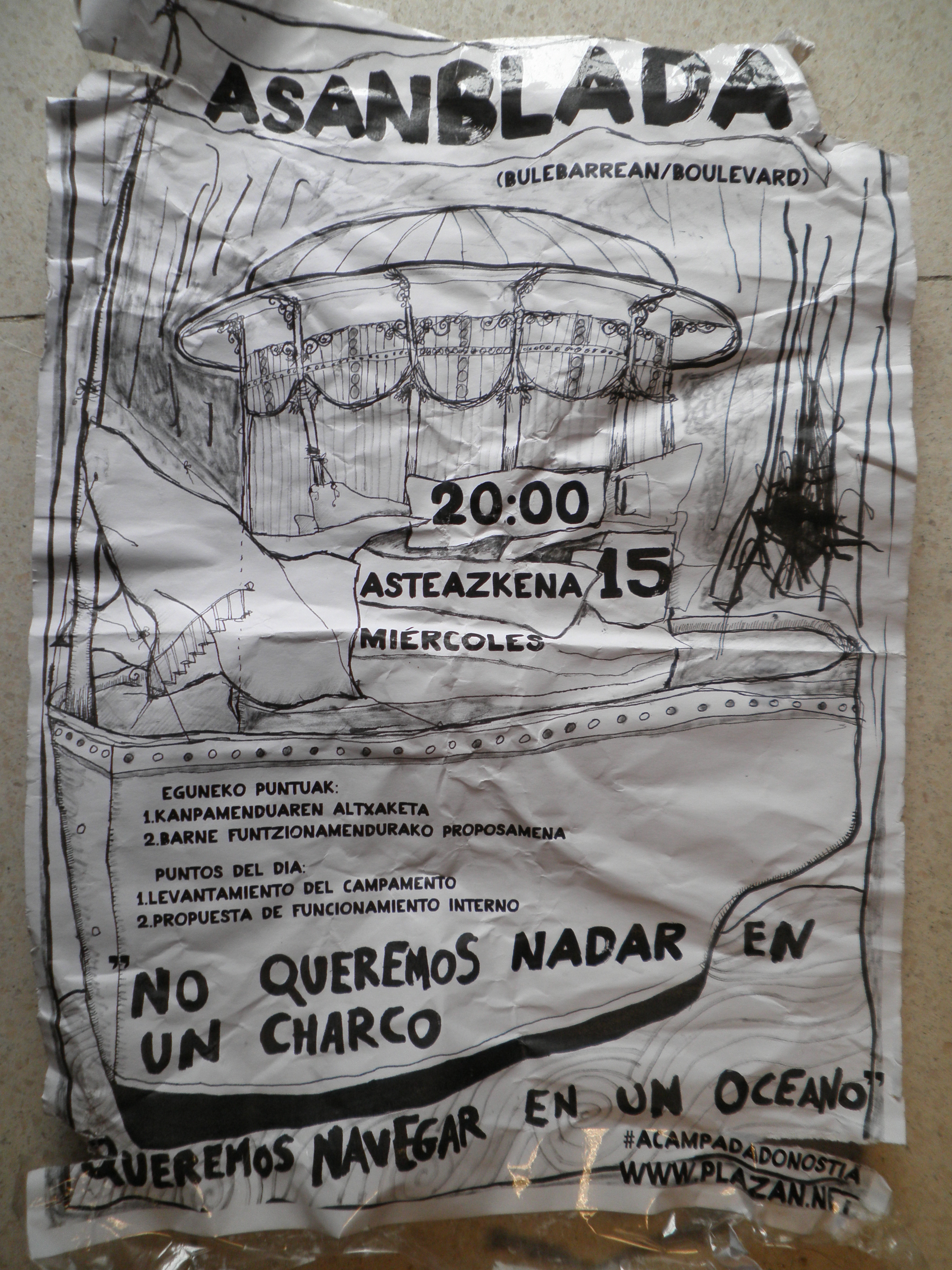 Asanbladarako deia.